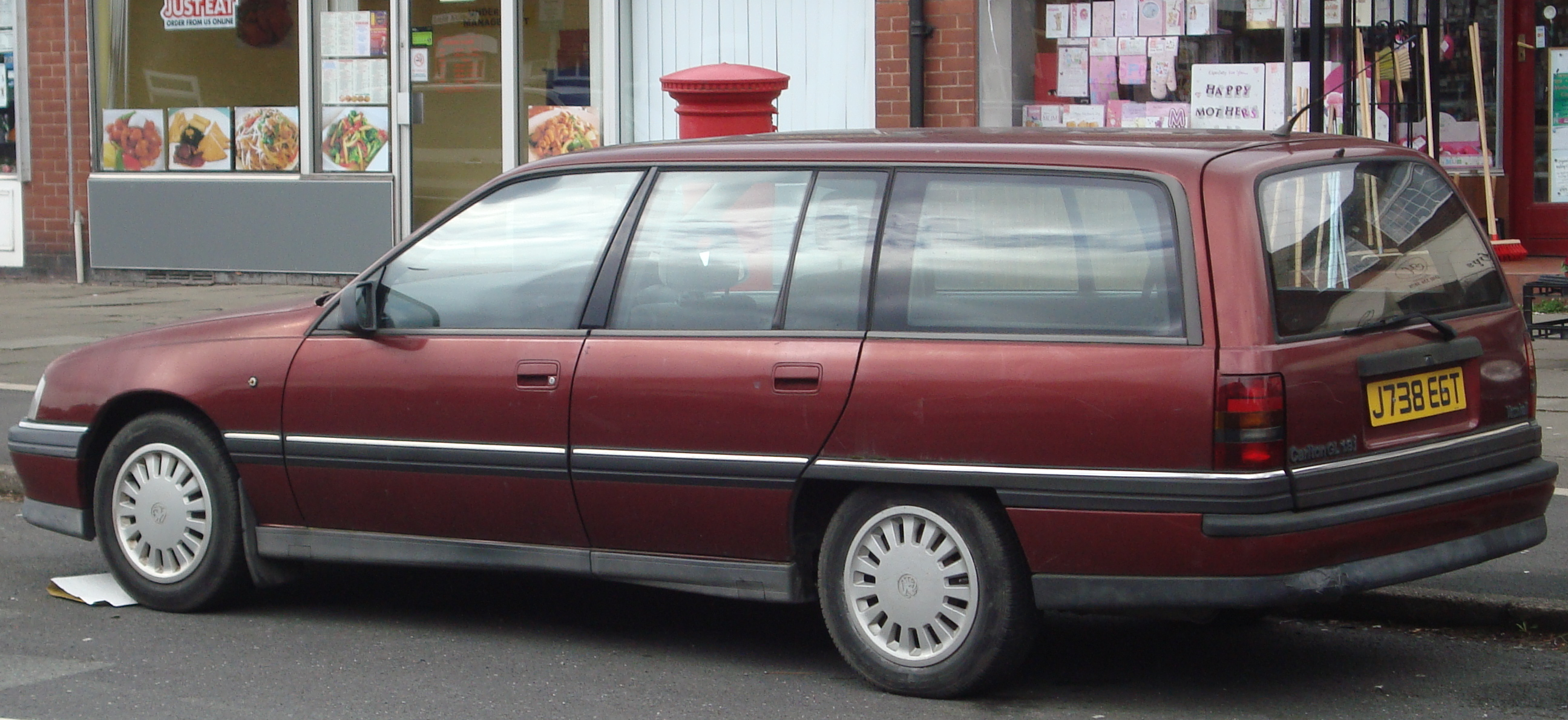 1992 Vauxhall Carlton 1.8 GL Estate